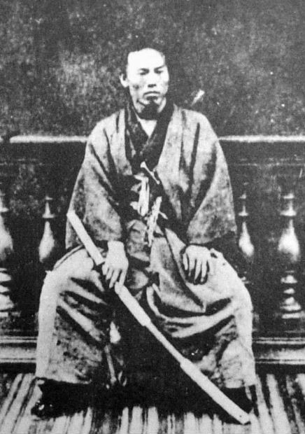 a Japanese man 伊藤博文 (Hrobumi Ito)